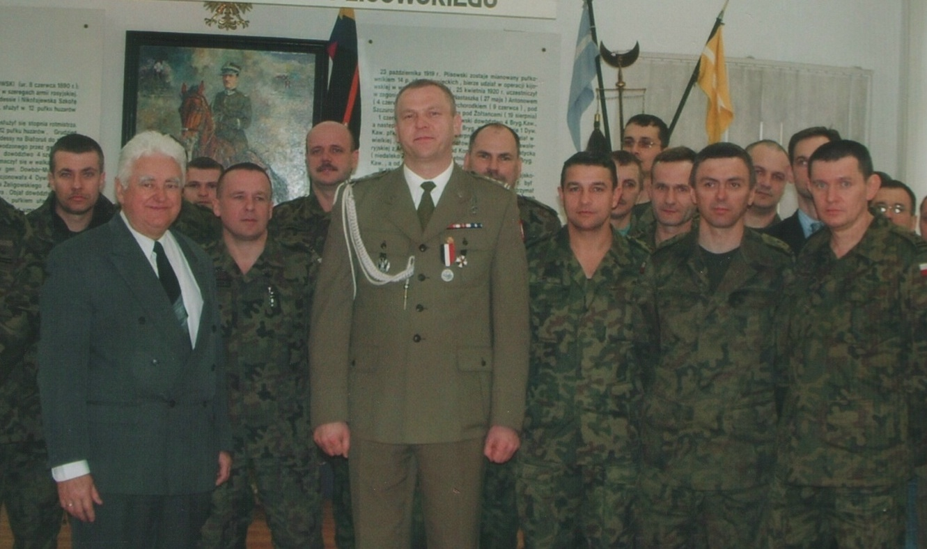 Od prawej dowódca 2bzmot 12BZ ppłk Krzysztof Stachowiak